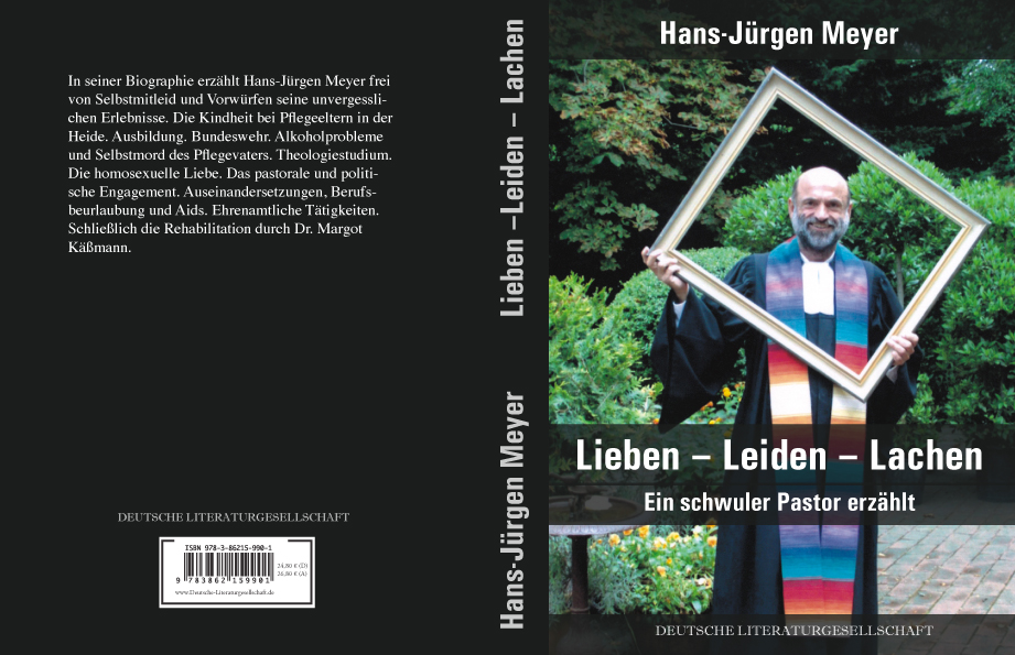 Buchdeckel (Cover) des Verlages Deutsche Literaturgesellschaft von Hans-Jürgen Meyer's Buch Lieben - Leiden - Lachen. Ein schwuler Pastor erzählt